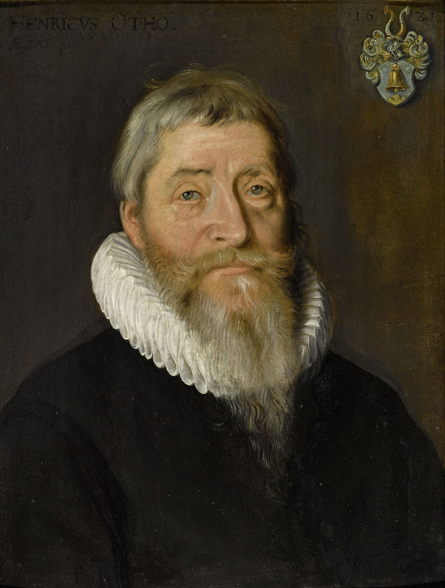 Portrait des Heinrich Otth d. Ä., Pfarrer zu Wintersingen.